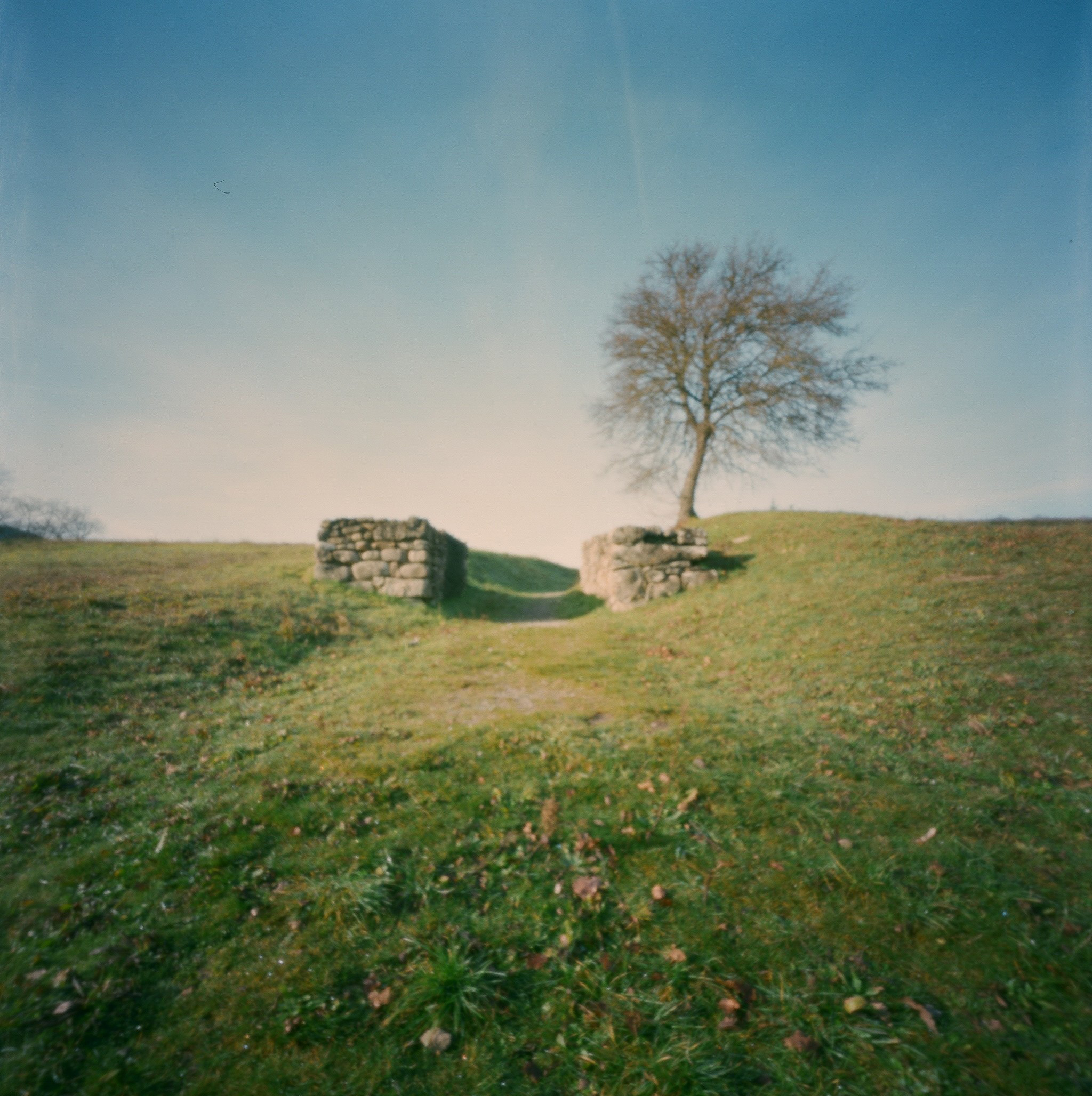 Area archeologica di Marzabotto/Kainua - MIBAC This is a photo of a monument which is part of cultural heritage of Italy.